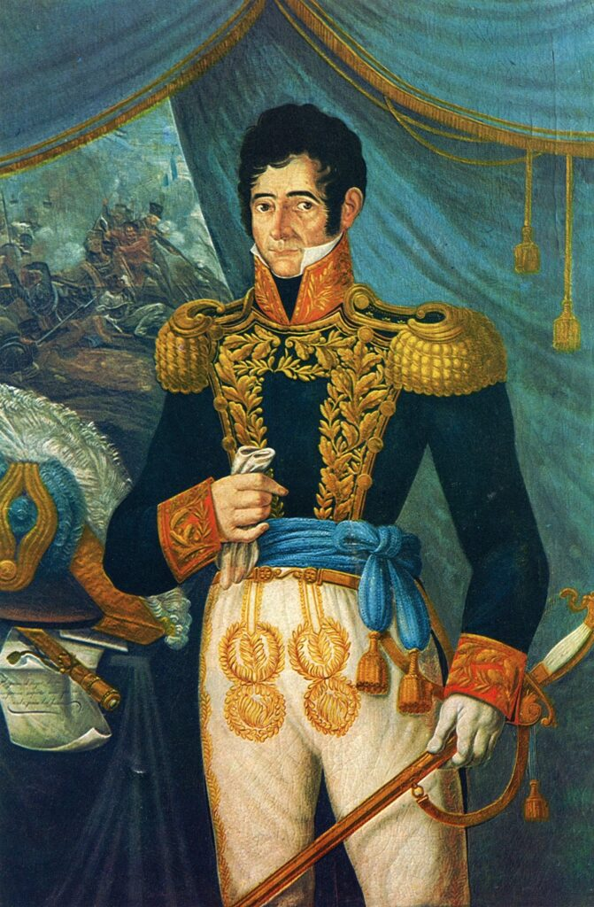 Retrato de José Rondeau, militar rioplatense del siglo XIX.